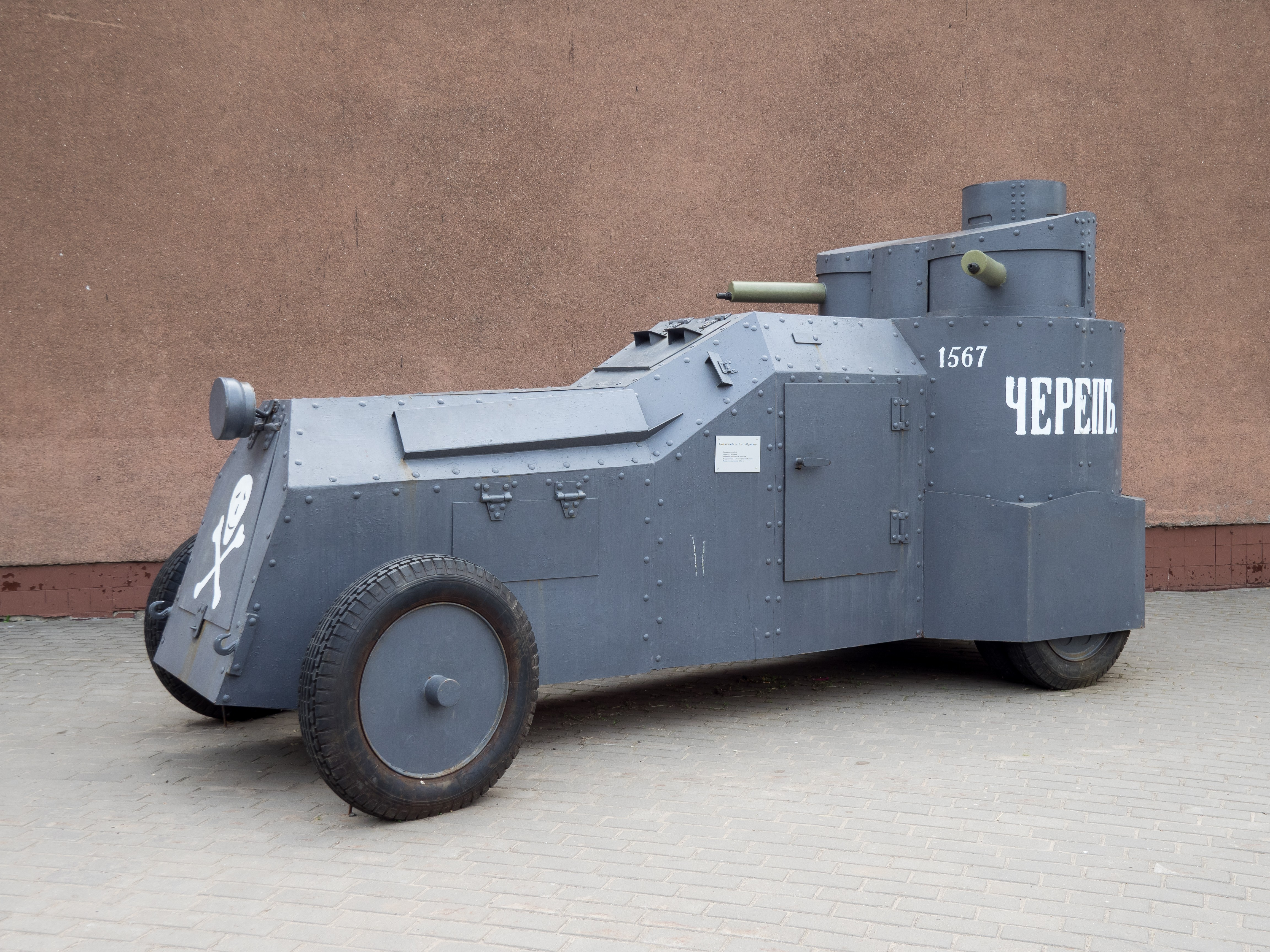 Мгебров-Изотта-Фраскини "Череп"